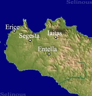 Selinous, 2008 Opera propria Principali città elime